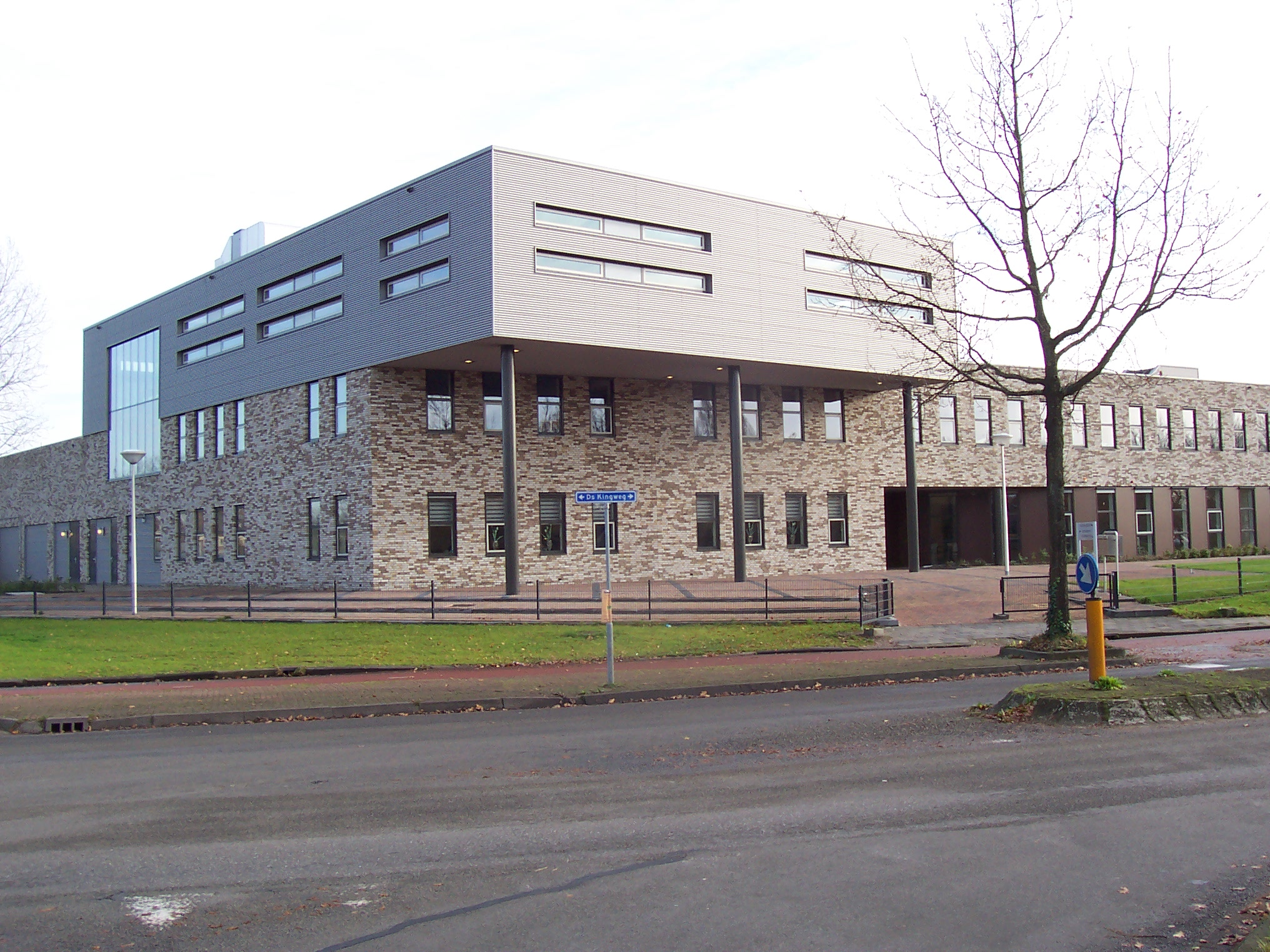 Hoofdingang van de SBO aan het VMBO-Plein te Heerenveen